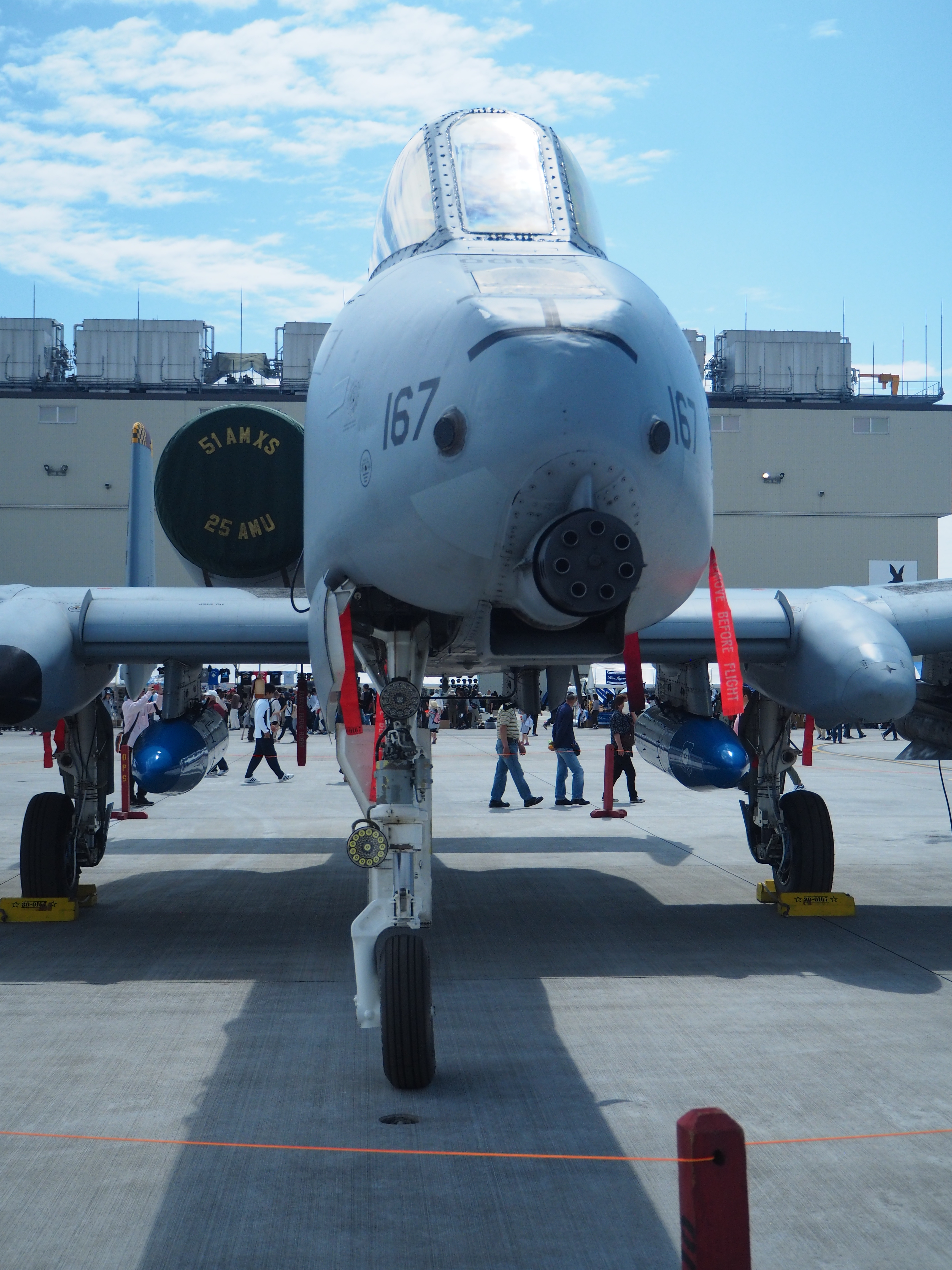 2017May05岩国基地でA-10をほぼ正面から撮影